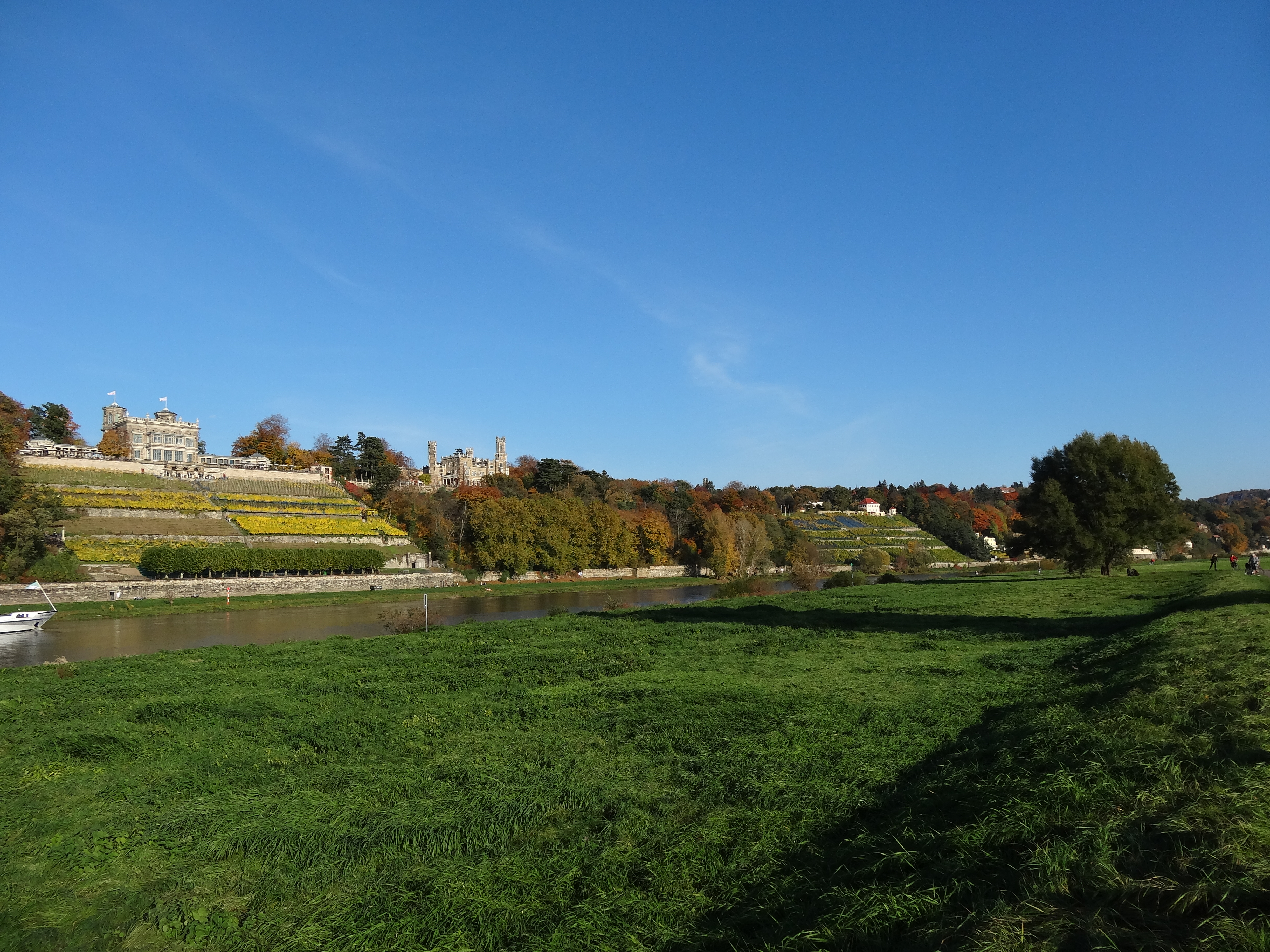 Blick vom Elberadweg in Dresden. Links der Elbe: Lingnerschloss, Schloss Eckberg und Dinglingers Weinberg. Rechts der Elbe das Käthe-Kollwitz-Ufer, Dresden